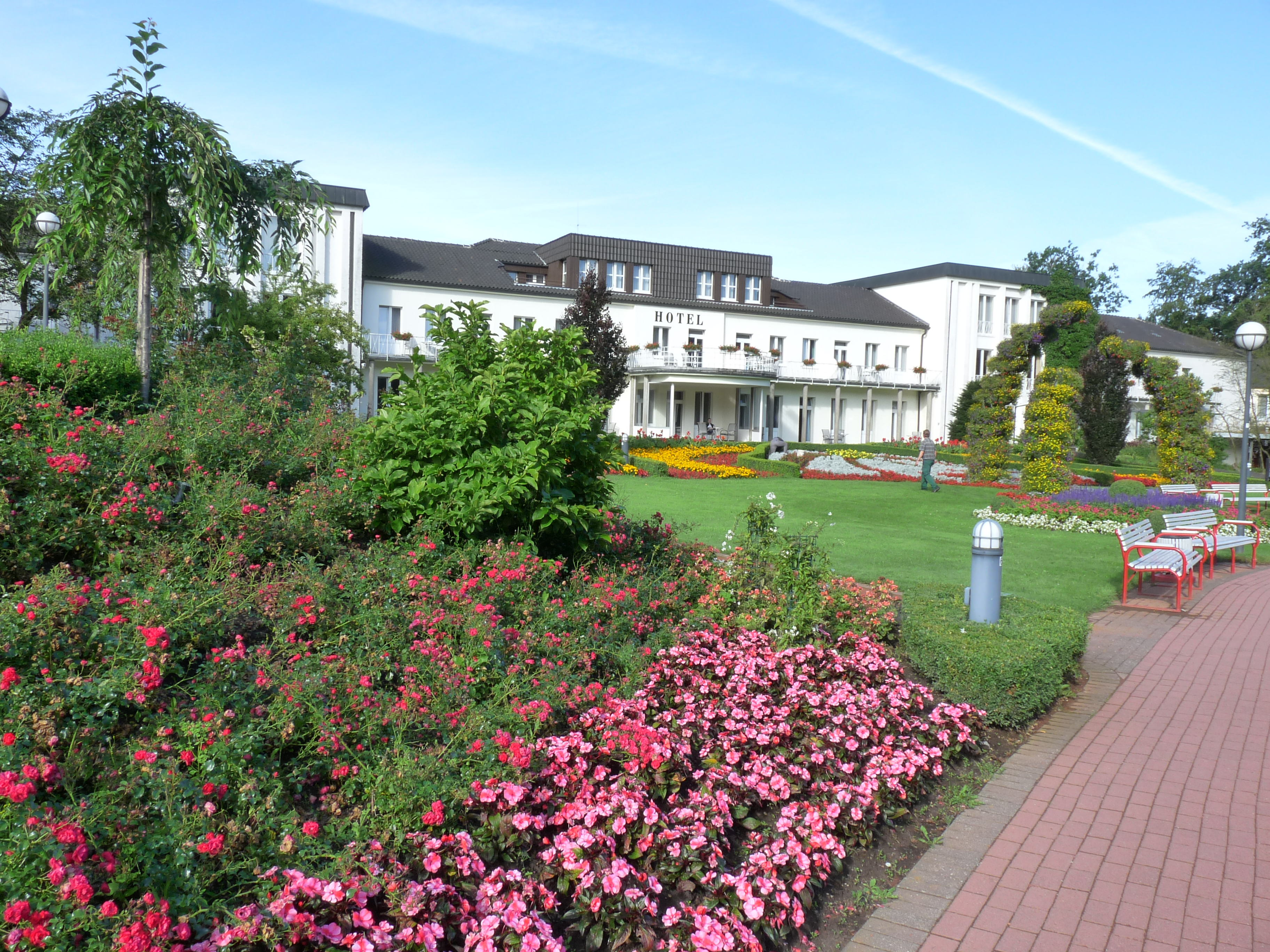 Best Western PREMIER Parkhotel Bad Lippspringe.